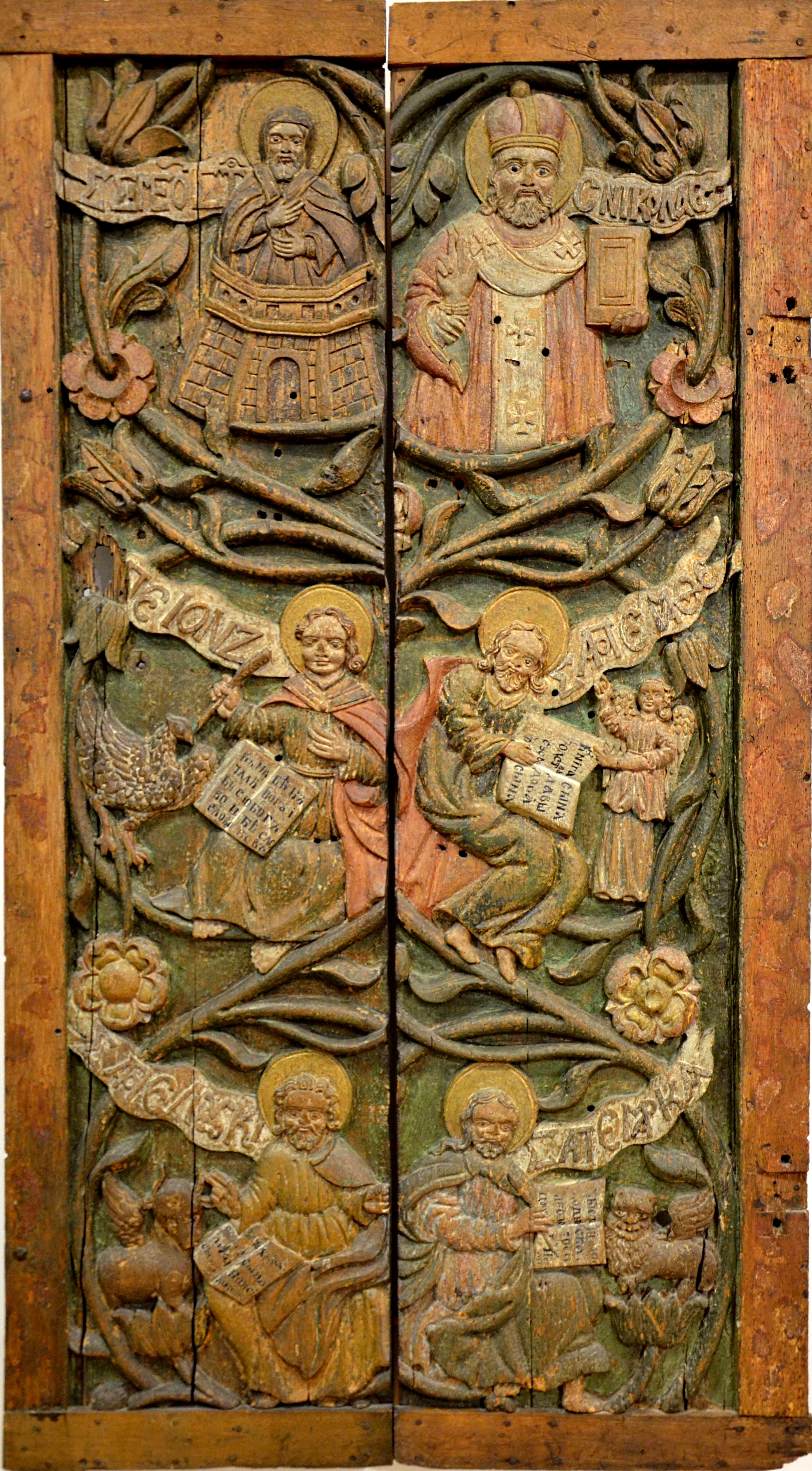 Віцебскія царскія вароты з Юр'еўскай царквы